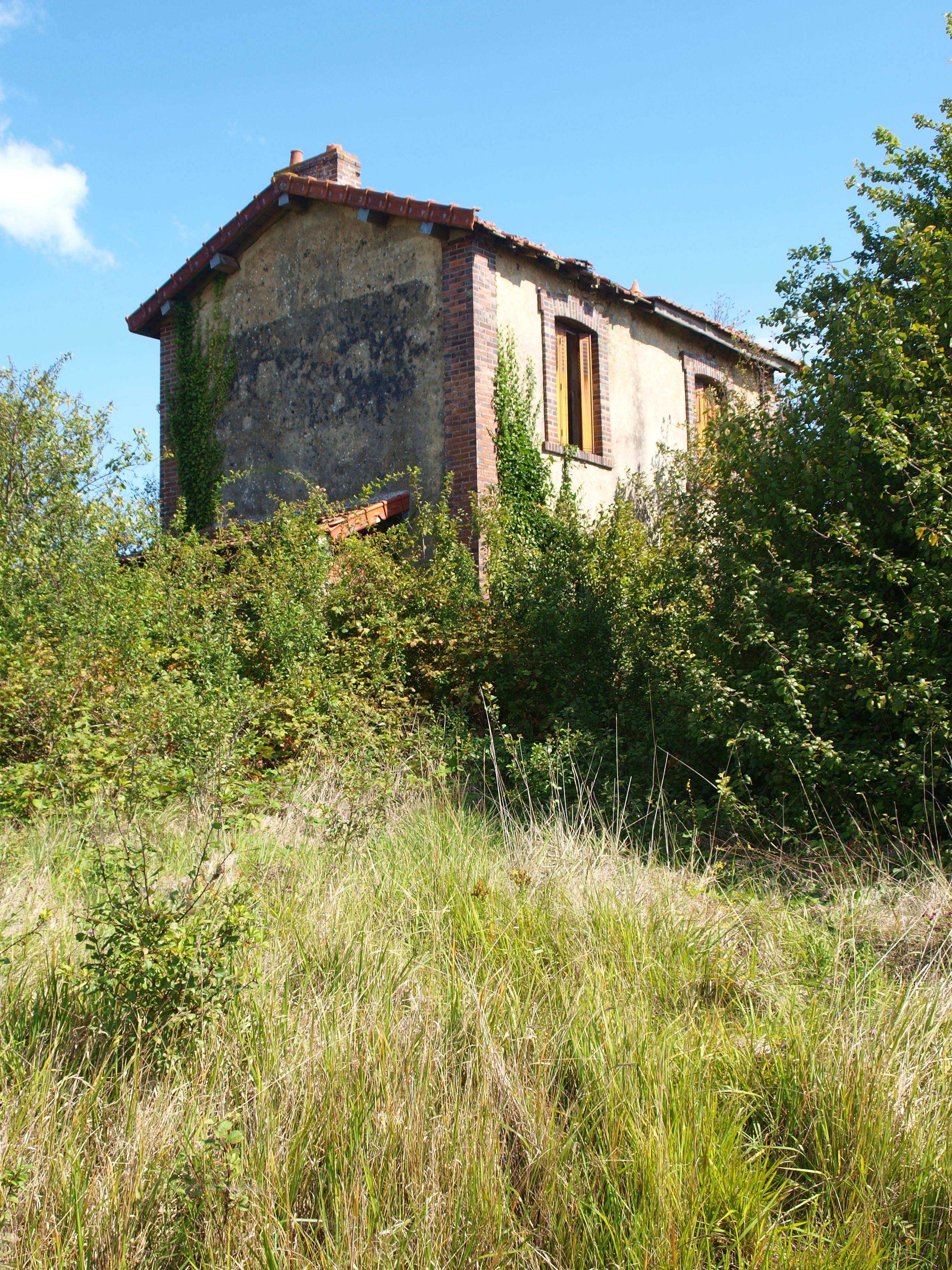 Perceneige (Yonne, France) ; village de Courroy : gare désaffectée de la Ligne Sens - Villeneuve-l'Archevêque et Saint-Maurice-aux-Riches-Hommes - Nogent-sur-Seine.